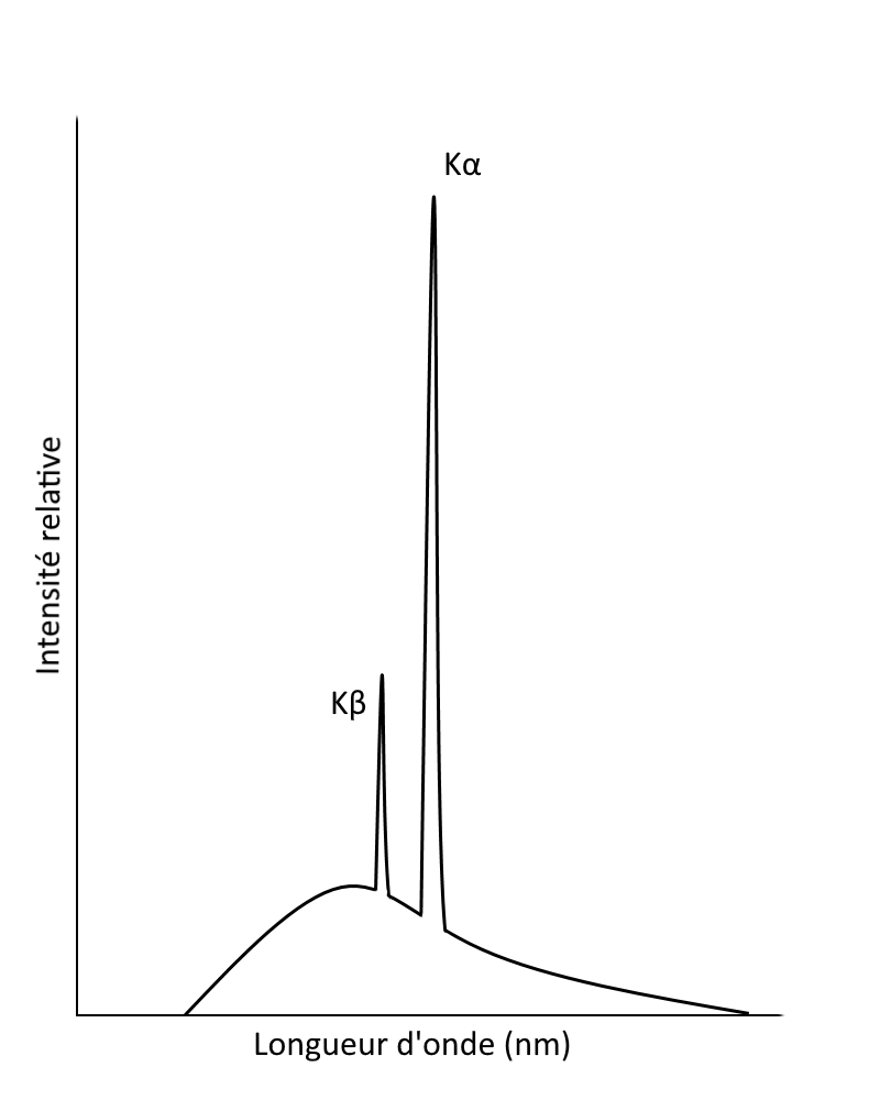 intensité des différentes transitions électroniques et leurs longueurs d'ondes respectives